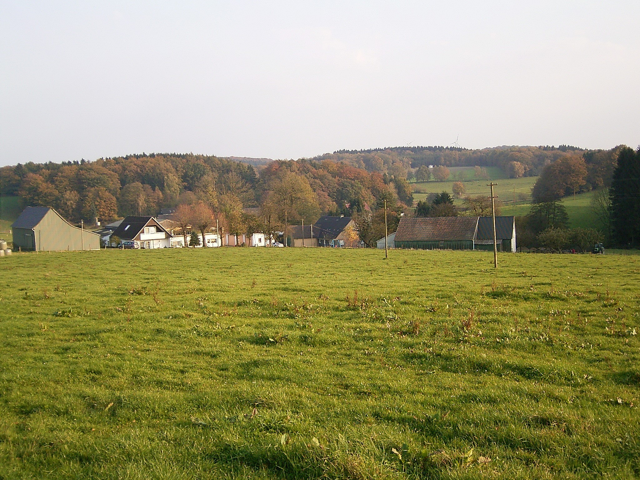 Radevormwald